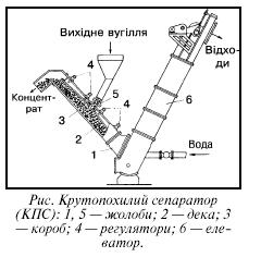 Зображення:Круто-похилий сепаратор.JPG: Круто-похилий сепаратор